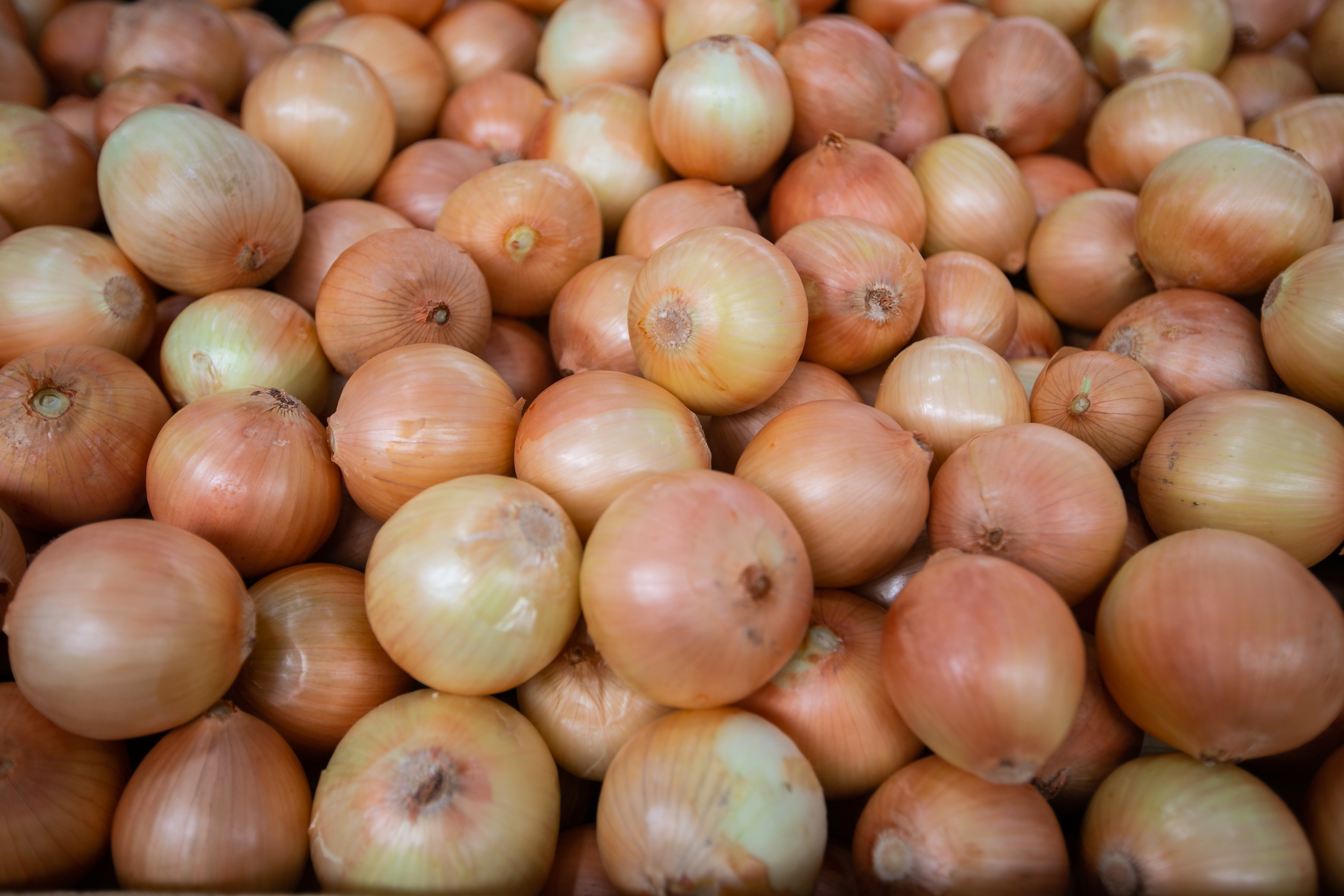 Produtos do Agro Paulista